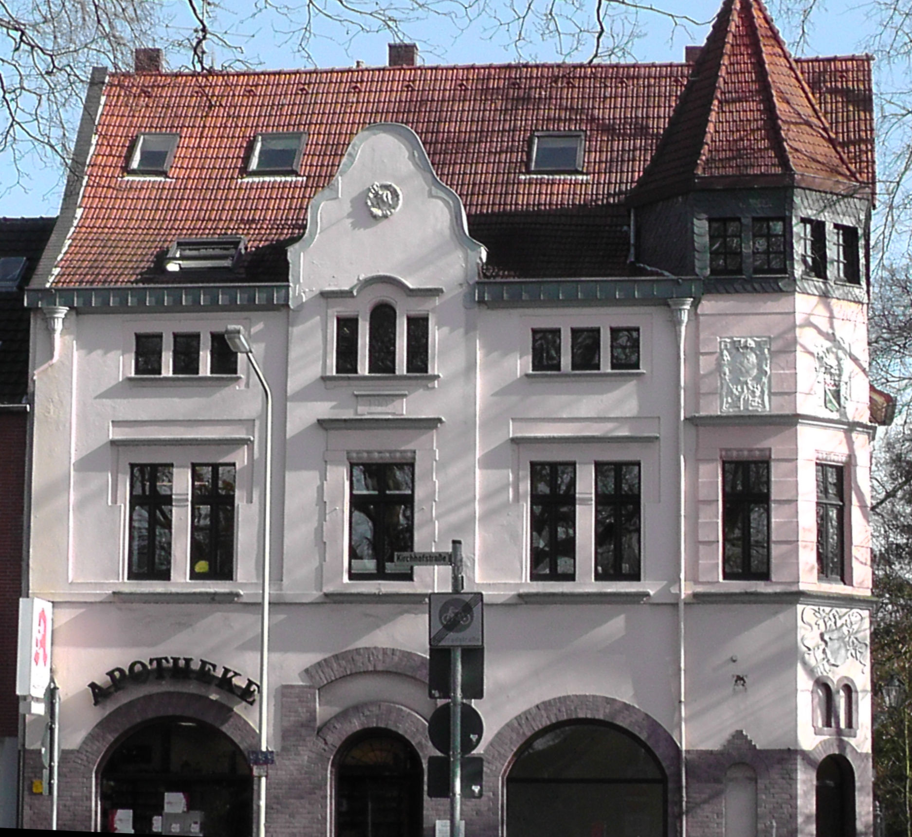 Hilden, Kirchhofstraße 73, Turm-Apotheke, Baujahr 1903, Architekt: Walter Furthmann This is a photograph of an architectural monument.